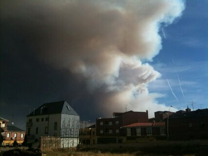 Nube de cenizas del incendio de Castrocontrigo de 2012 sobre la ciudad de Astorga (León, España).